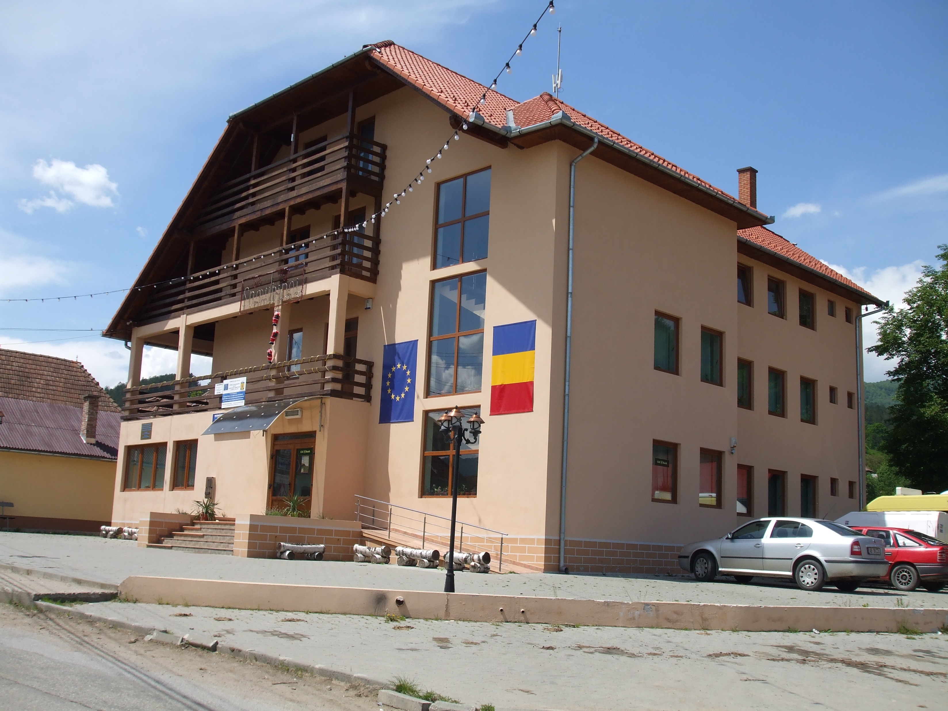 Primaria Sălciua, jud. Alba